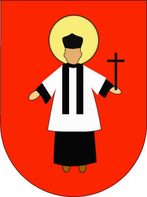 Herb wsi Cikowice, gmina Bochnia.